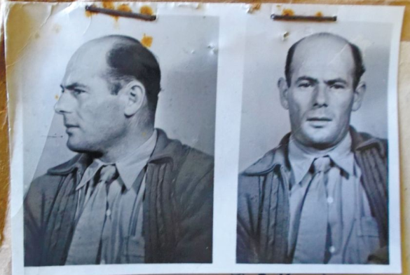 יחזקאל אינגסטר, אחראי בלוק במחנה באובליק, גריידיץ ורייכנבך